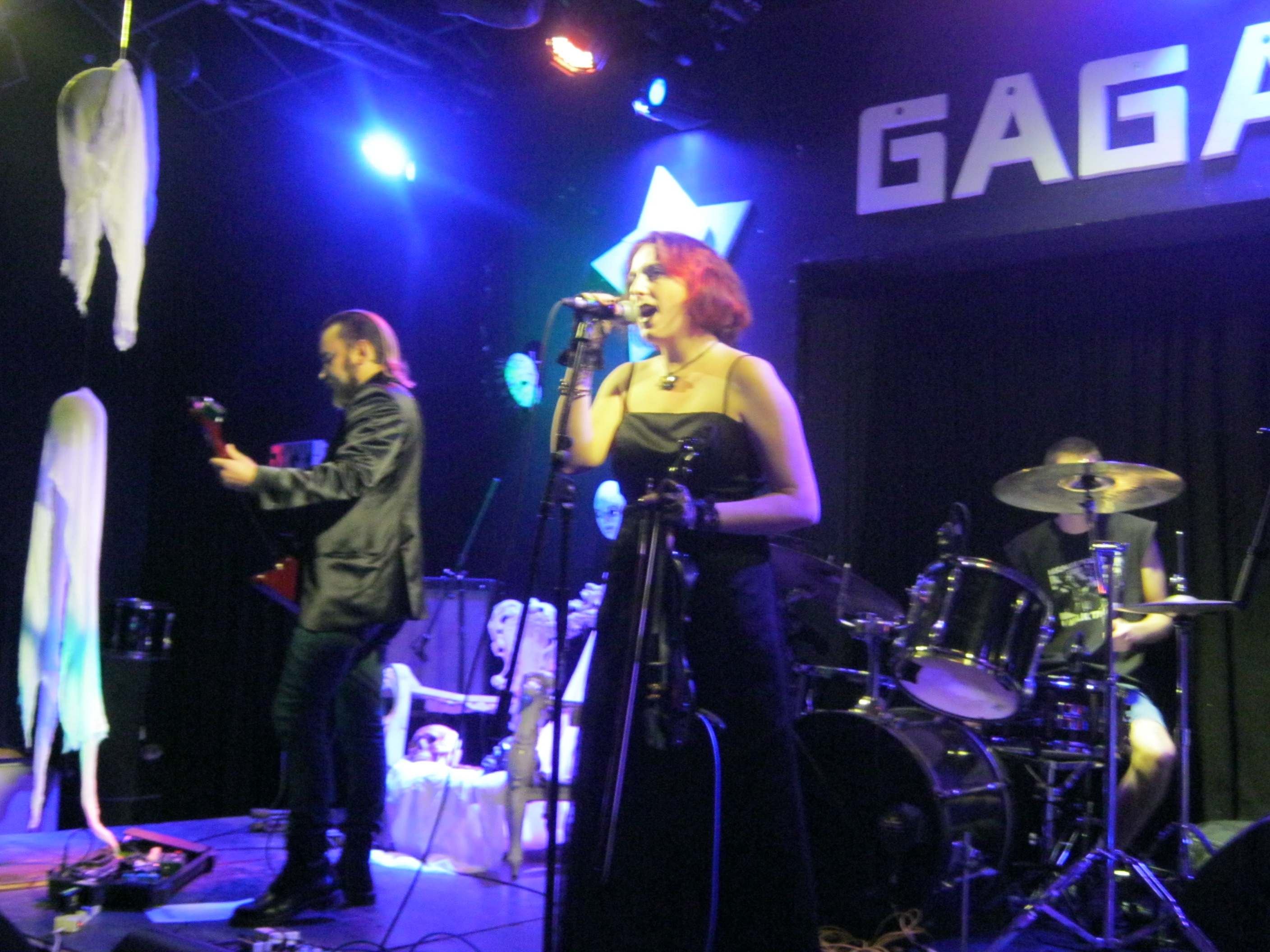 Fatum Aeternum 2015, Gagarin Club, Tel-Aviv